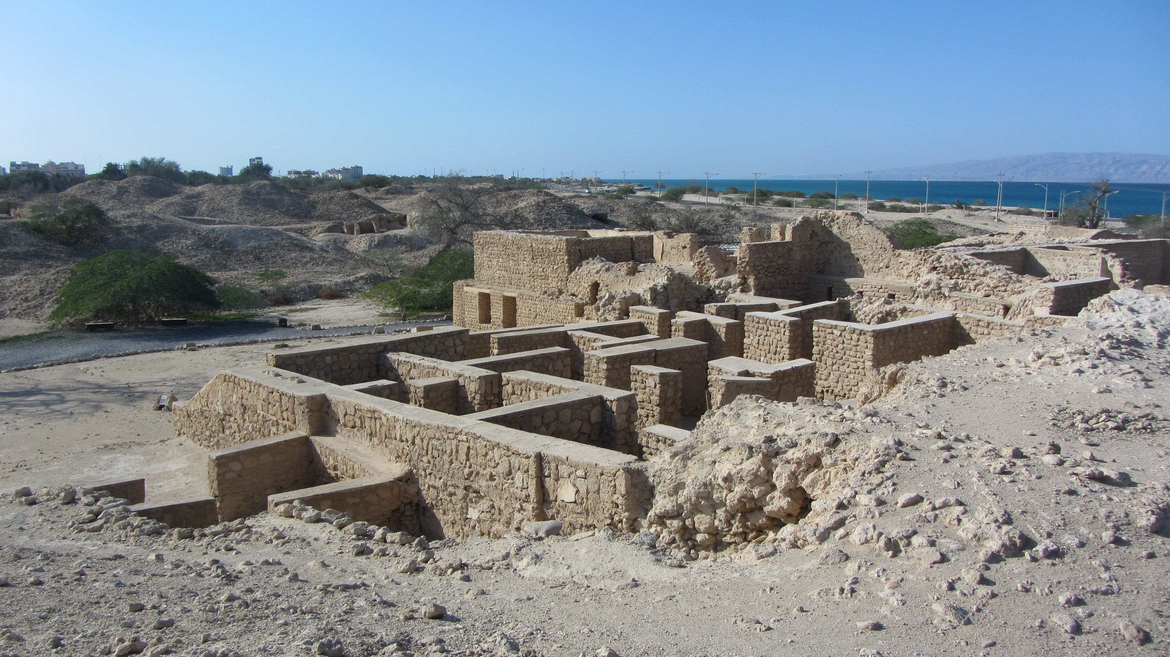 شهر حریره